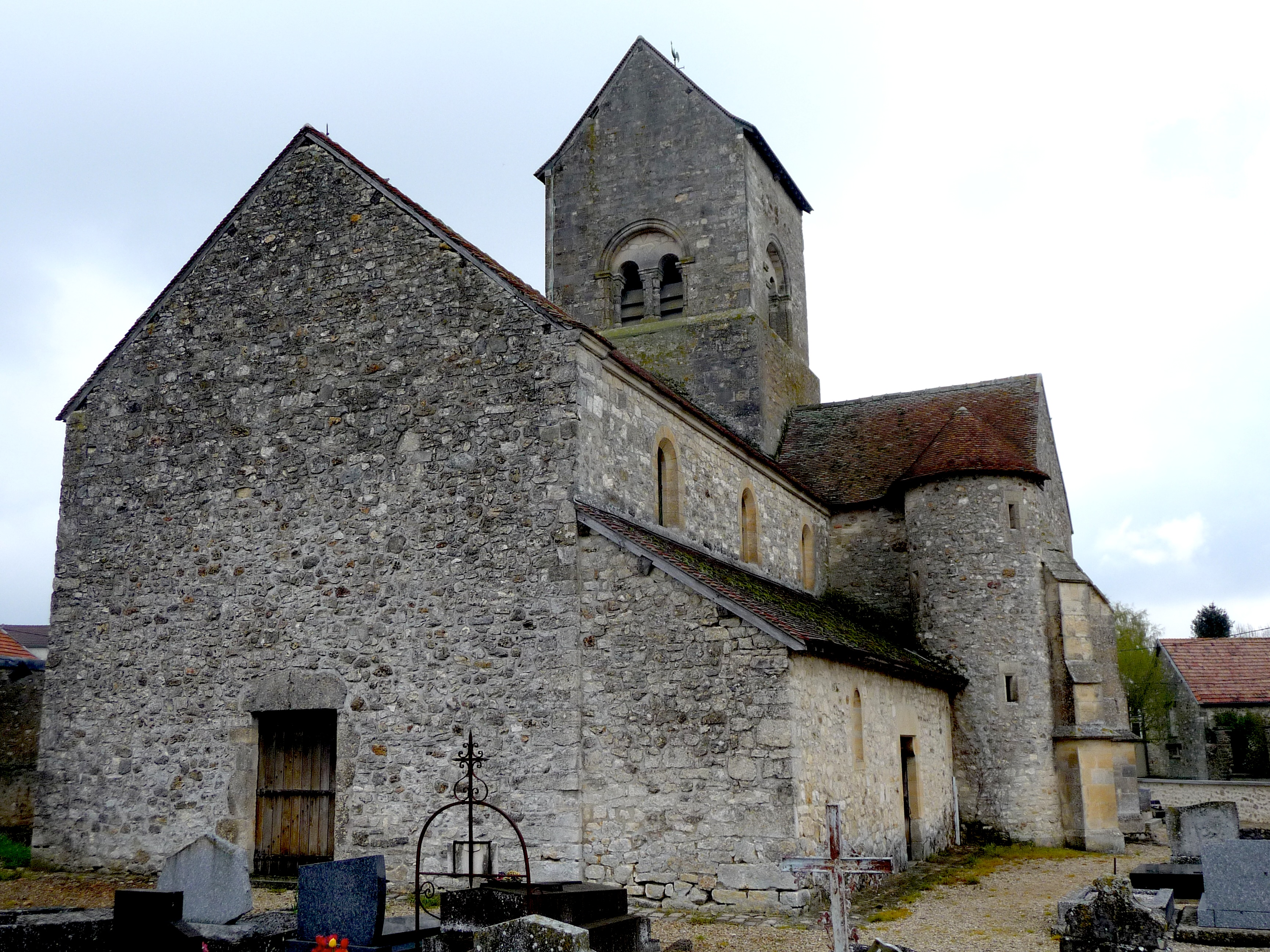 Eglise de Marfaux